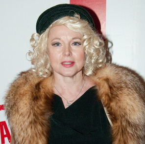 Елена Кондулайнен 20 марта 2011 года на премьере фильма «Служебный роман: Наше время»